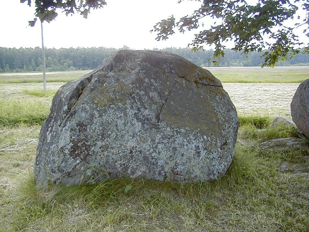 Mazirbes apkārtne, mēra akmens 2000-06-24